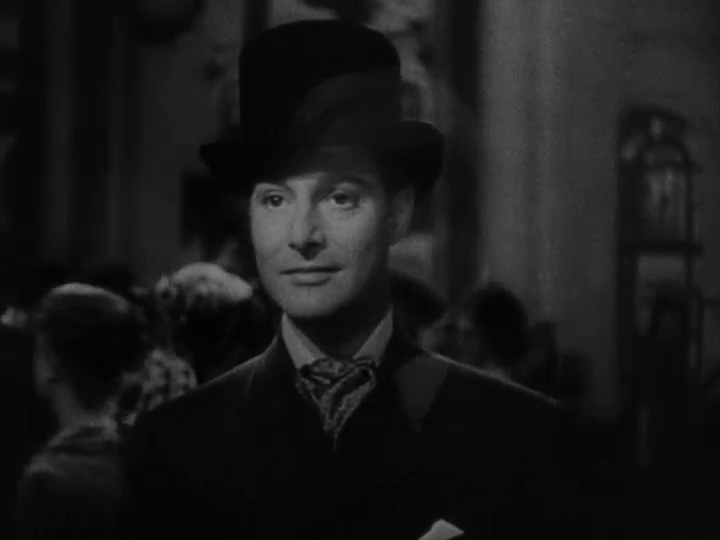 1939年製作の映画『チップス先生さようなら』の予告編動画より。1870年、25歳時のチップス先生を演じるロバート・ドーナット